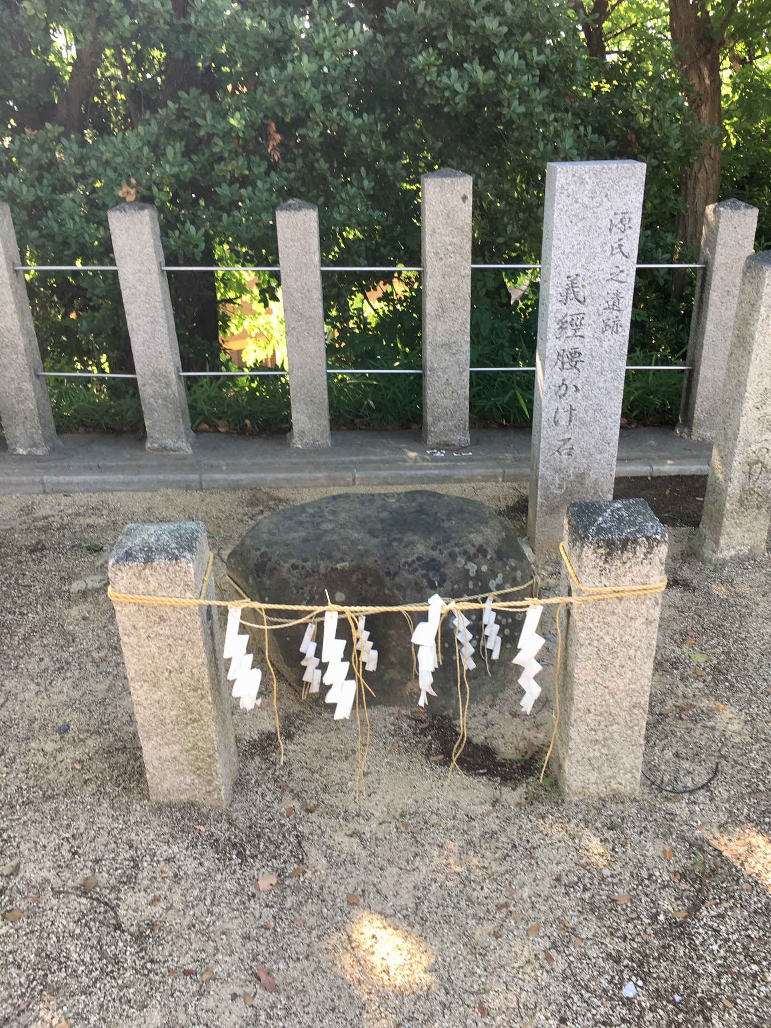 2019年7月、踞尾八幡神社で撮影。